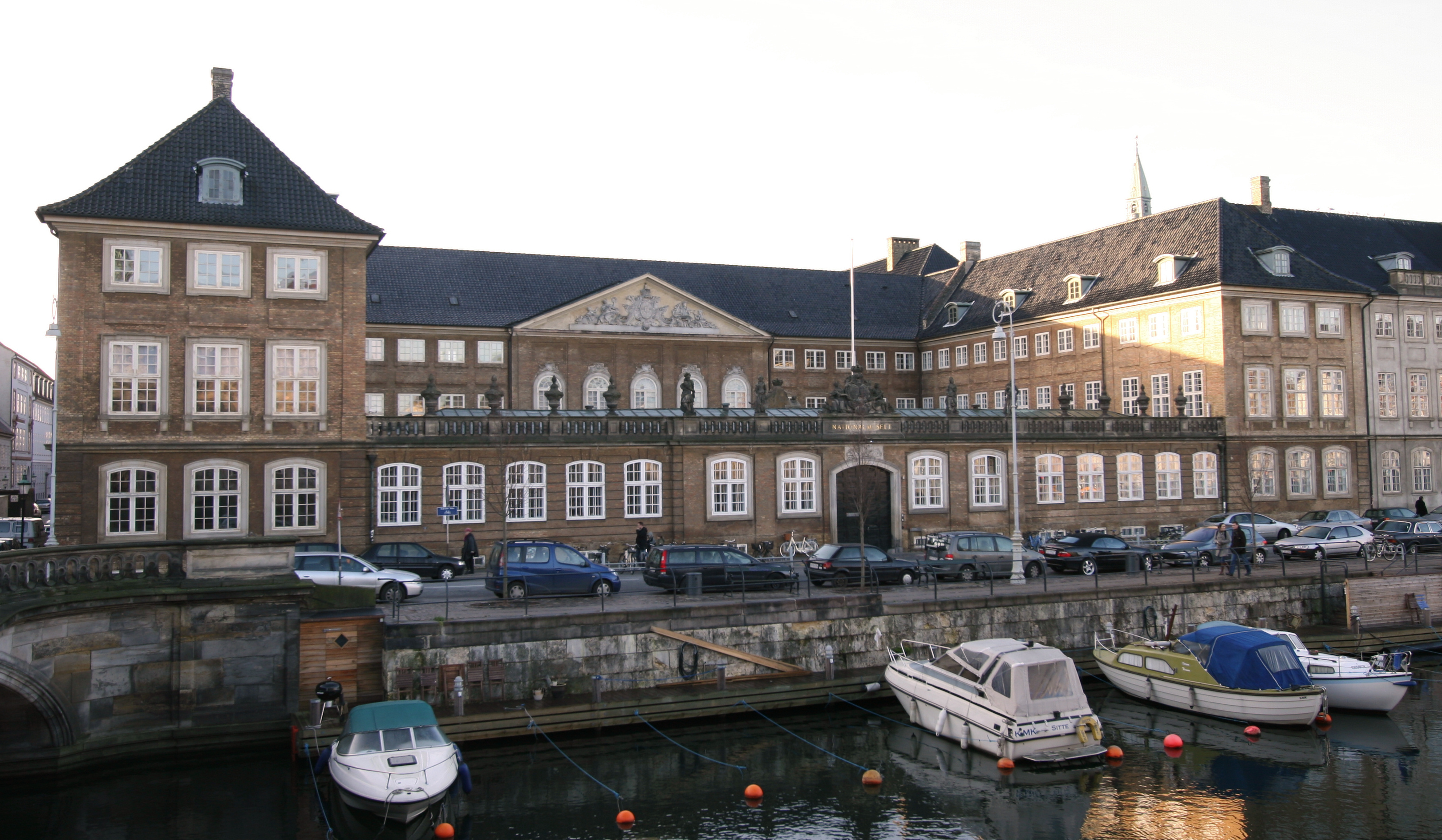 Prinsens Palæ, Copenhagen, Denmark. Prinsens Palæ, Nationalmuseet